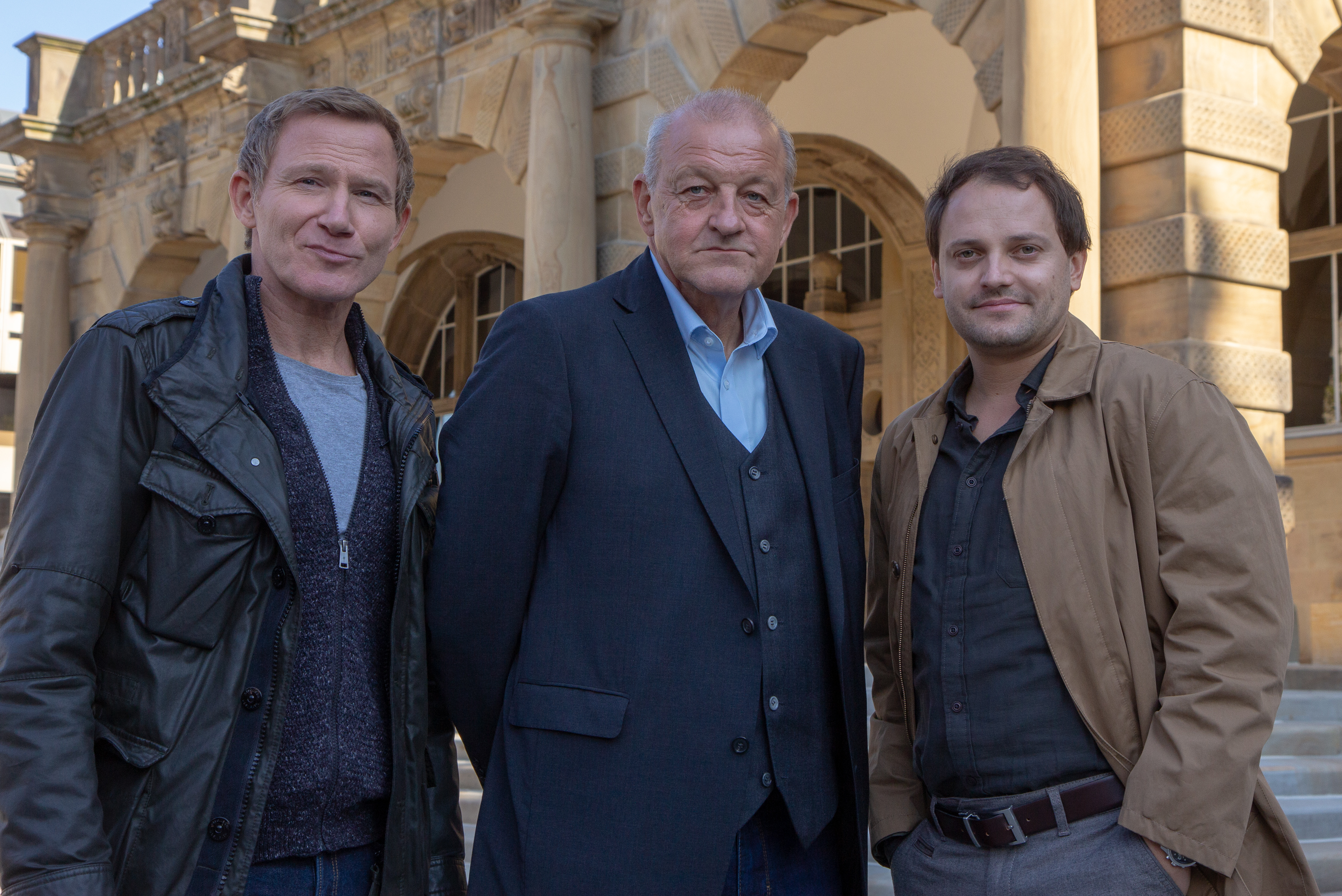 Pressetermin am Set "Wilsberg" am Alten Rathaus in Bielefeld am 15. Oktober 2018. Gruppe: Roland Jankowsky, Leonhard Landsink, Stefan Haschke